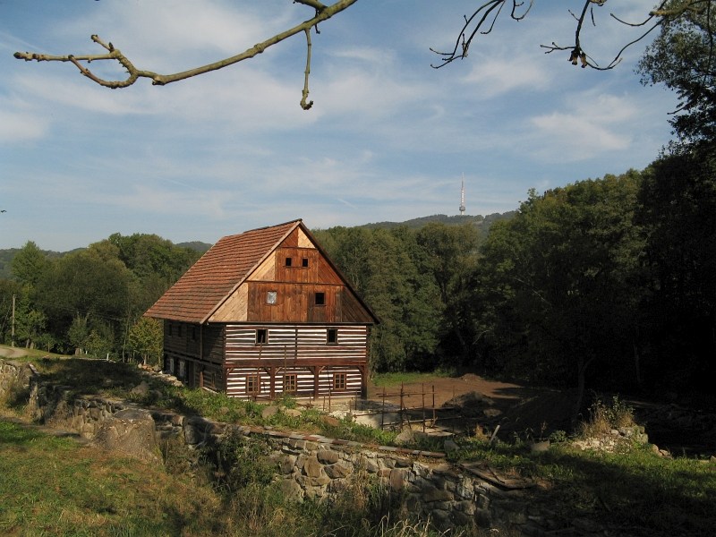 Vodní mlýn (Týniště), na V straně cesty ze Zubrnic u čp. 27, pův. Homole u Panny, Týniště